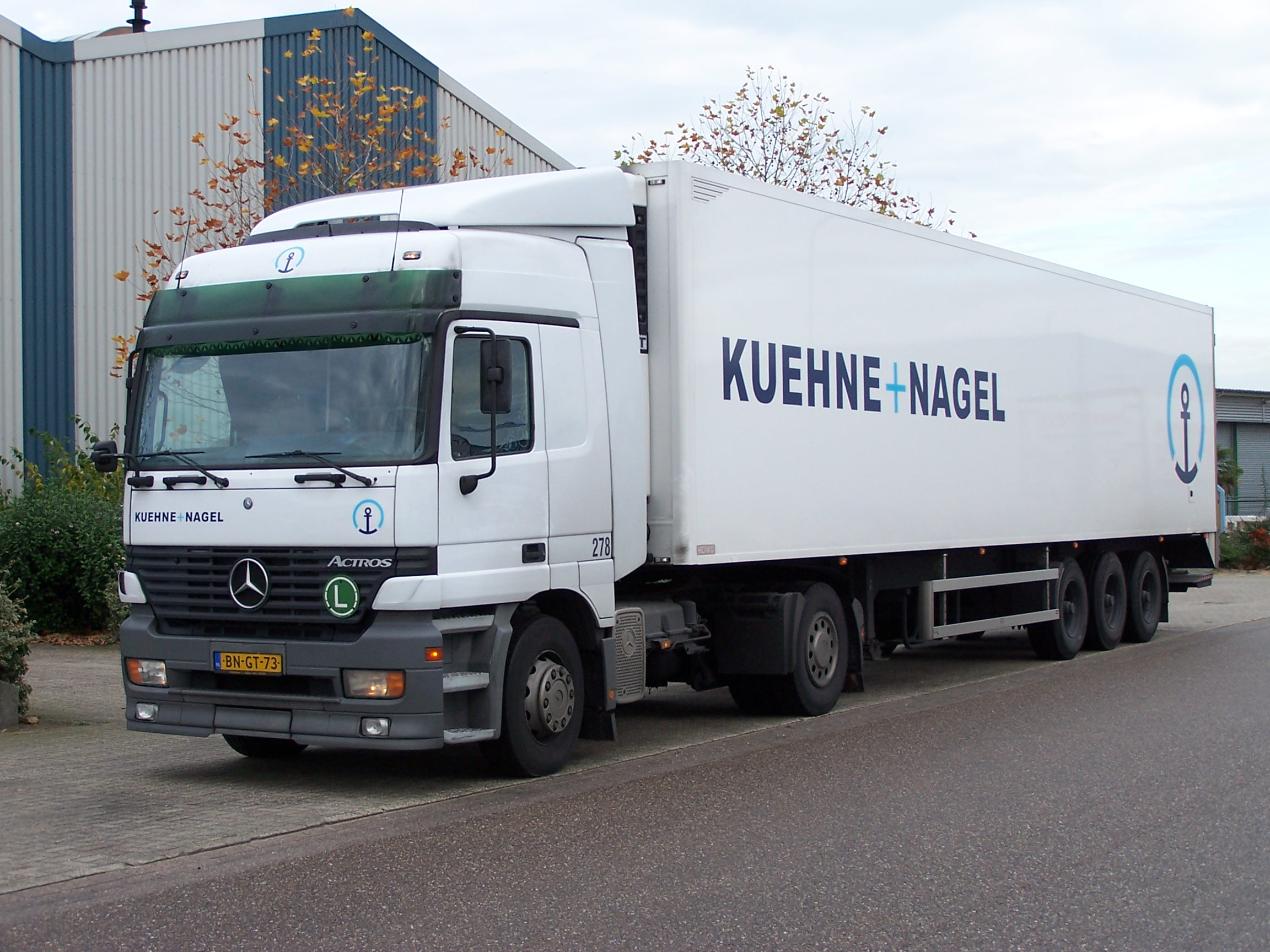 Description: K+N Mercedes Actros 1843 Source: "eigen werk" Date: 27-11-2006 Author: P. Kemps Permission: Toestemming van de auteur